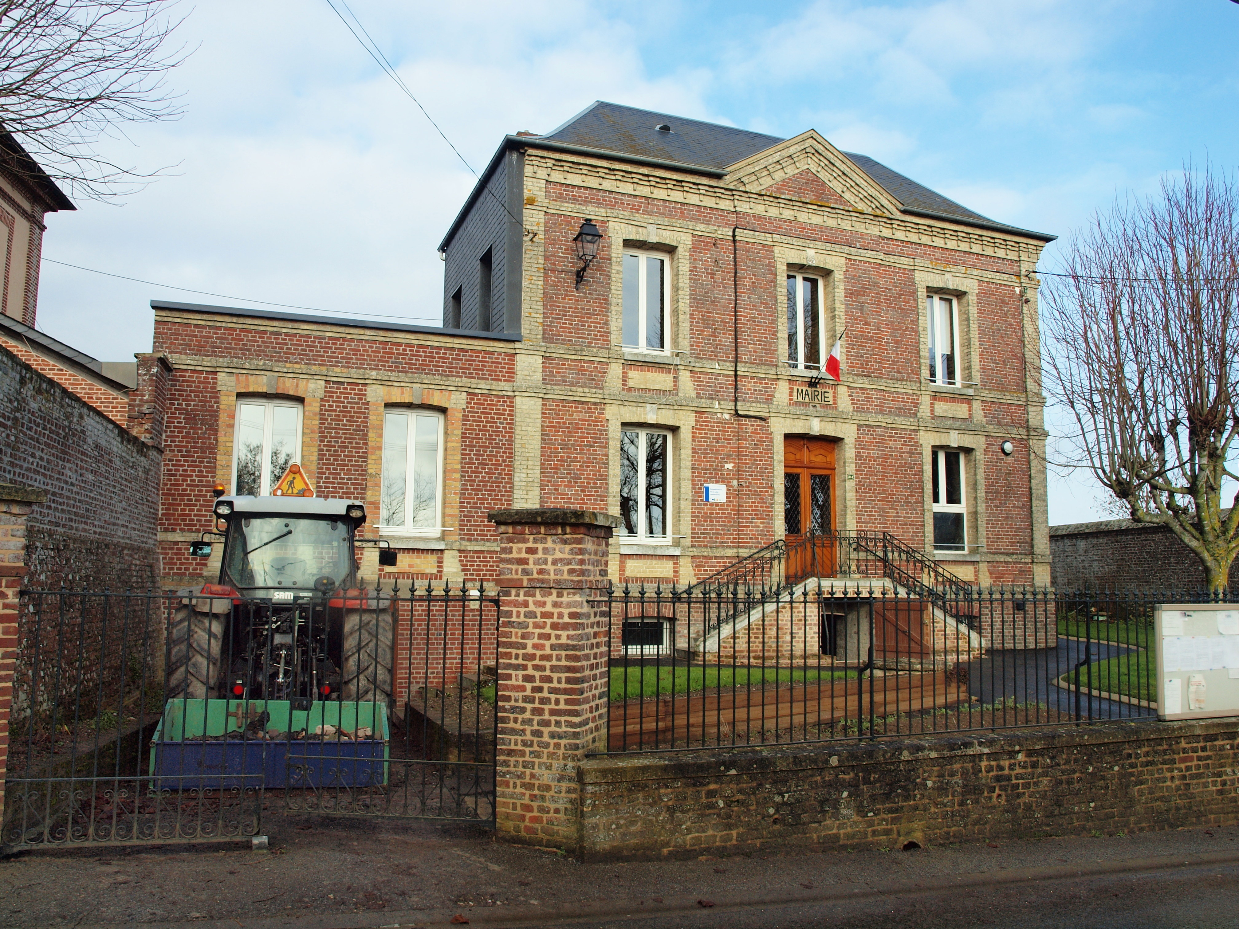 Sainte-Geneviève (Seine-Maritime, France)